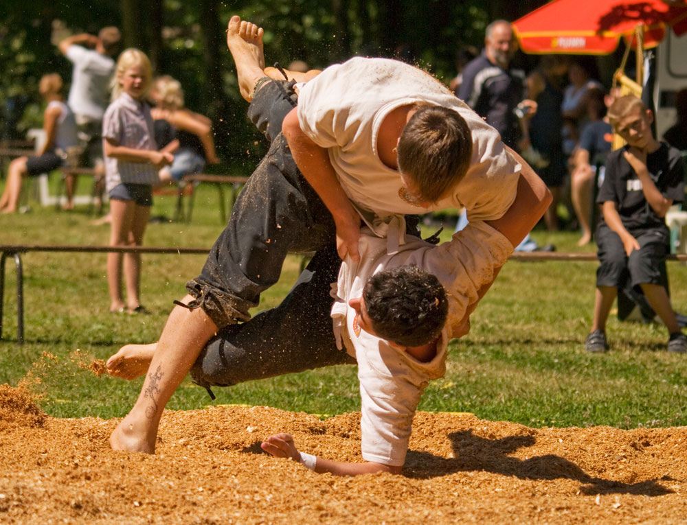 Joueurs de gouren, la lutte bretonne.